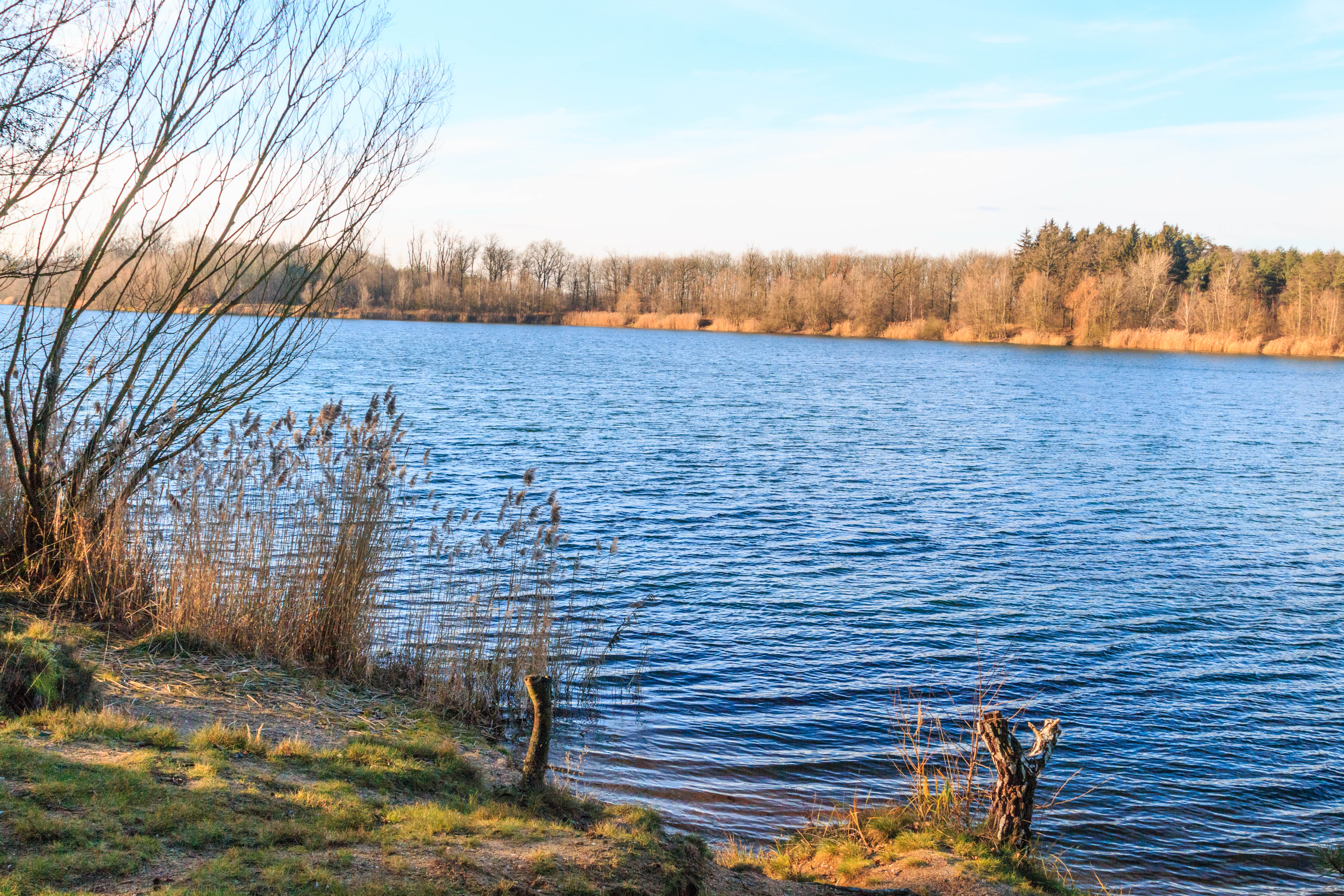 Písník Malá Čeperka Project: Vodstvo.